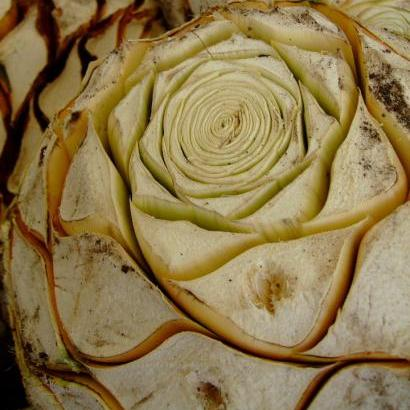 AgaveStem